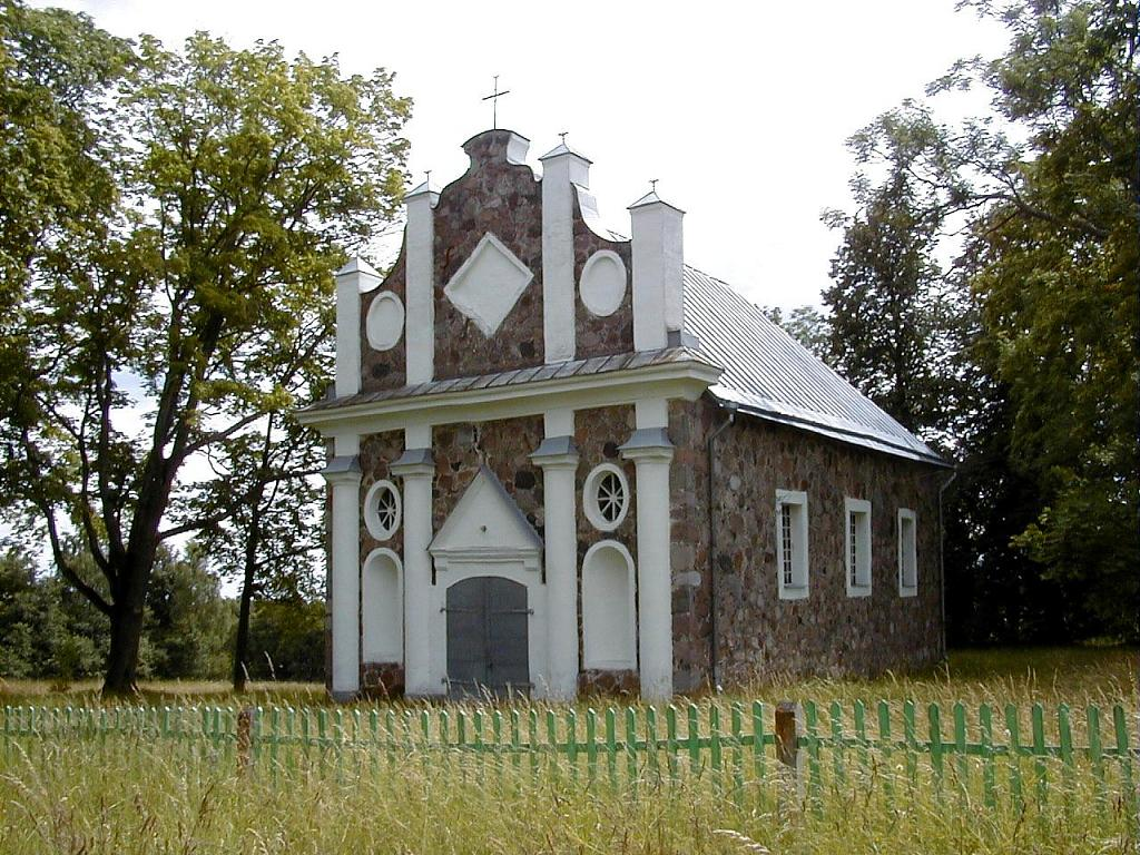 Gosporu baznīca. 2002-06-29